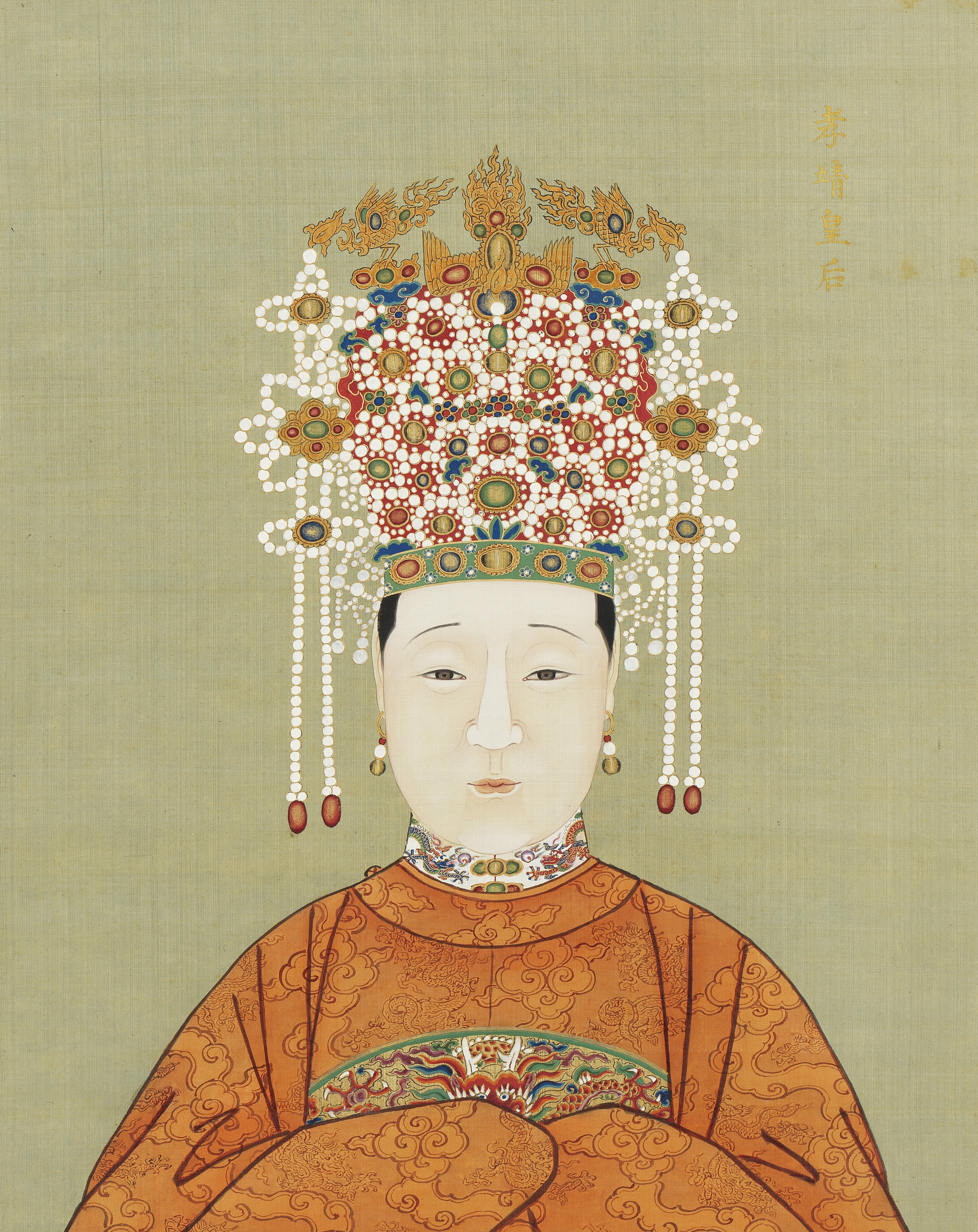 中文（中国大陆）: 作者已经去世超过200年，作品已经进入公有领域。